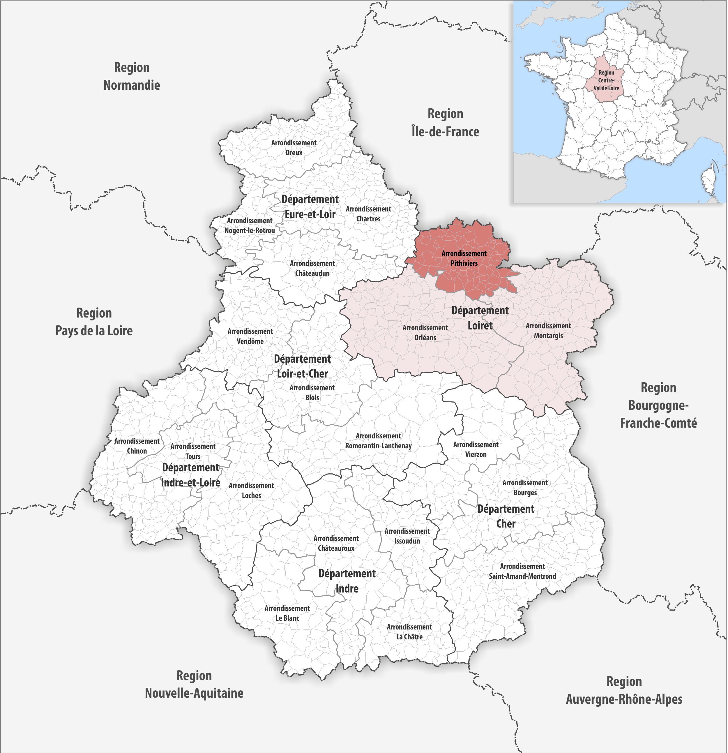 Lage des Arrondissements Pithiviers